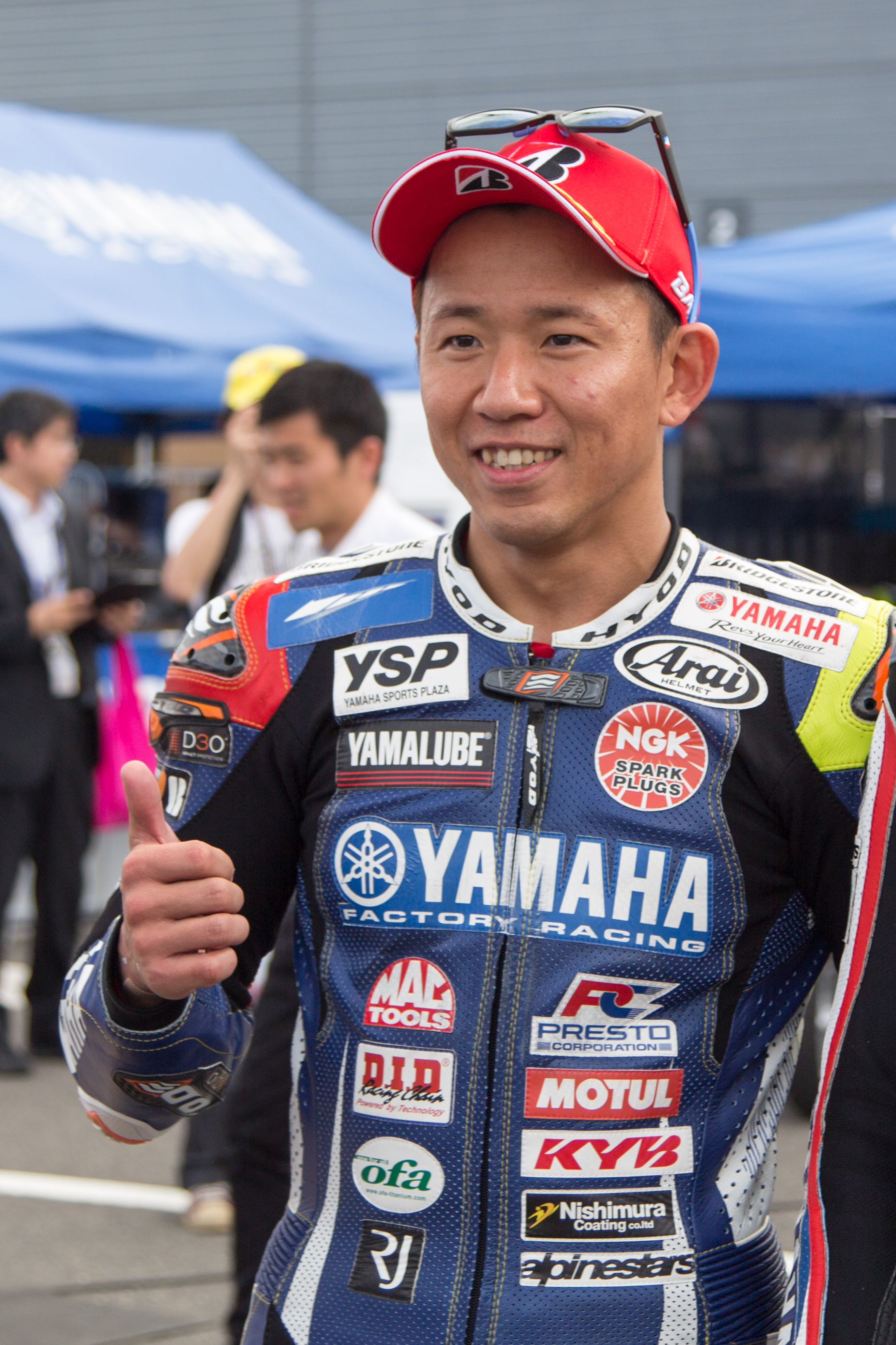 Katsuyuki Nakasuga at Twin Ring Motegi in 2016